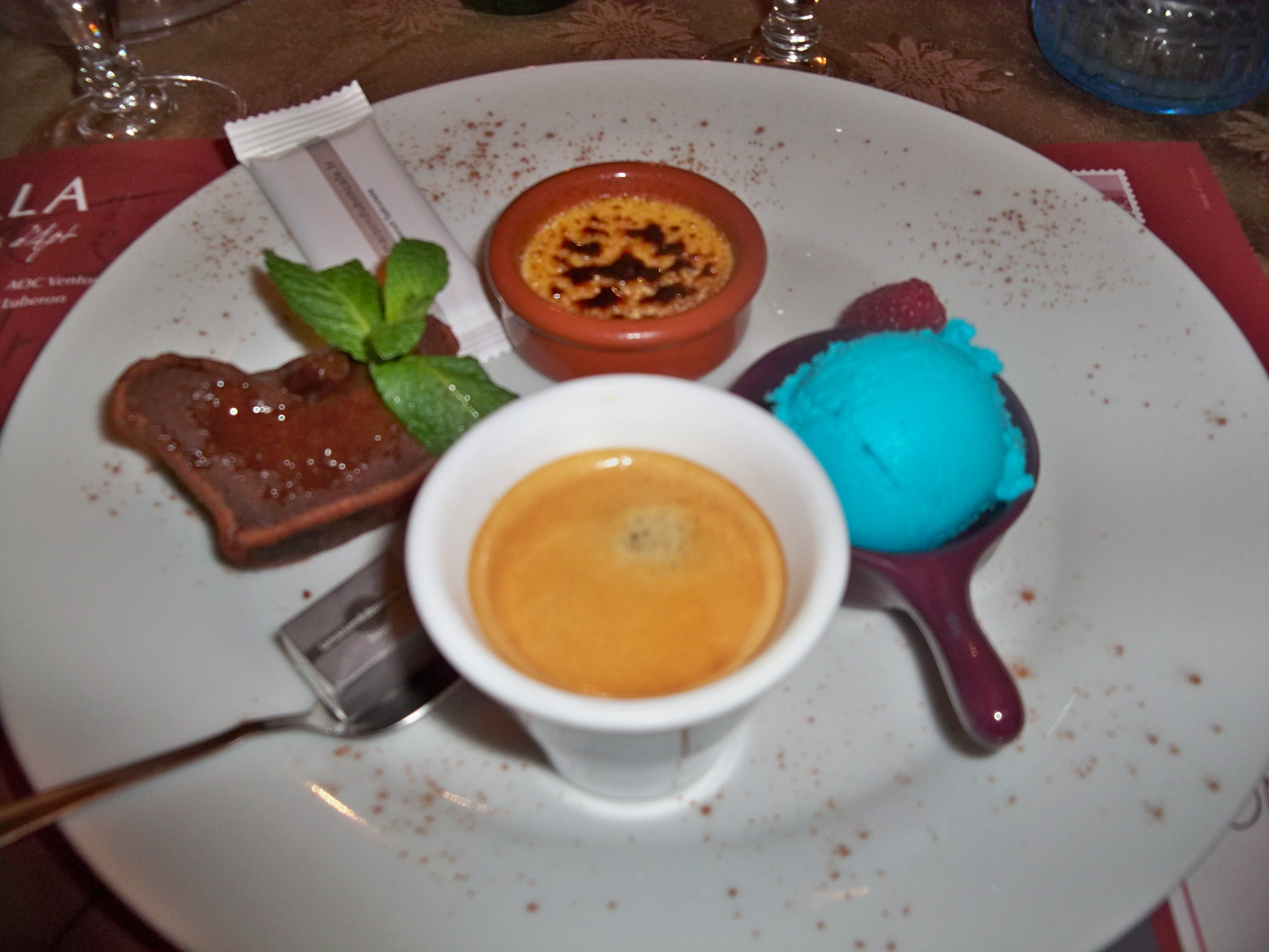 Café gourmand : Café accompagné de divers déssert.